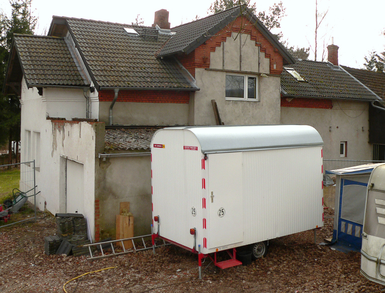 Kaiserbahnhof Springe